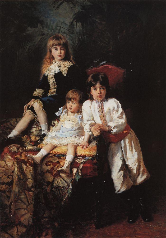 Дети господина Николая Петровича Балашова (1840-после 1920): Петр Николаевич Балашов (1871-1927), Андрей Николаевич Балашов (1874-1916) и Александра Николаевна Балашова (1877-1897).